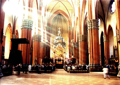 Basilica di San Petronio, Bologna, Italia